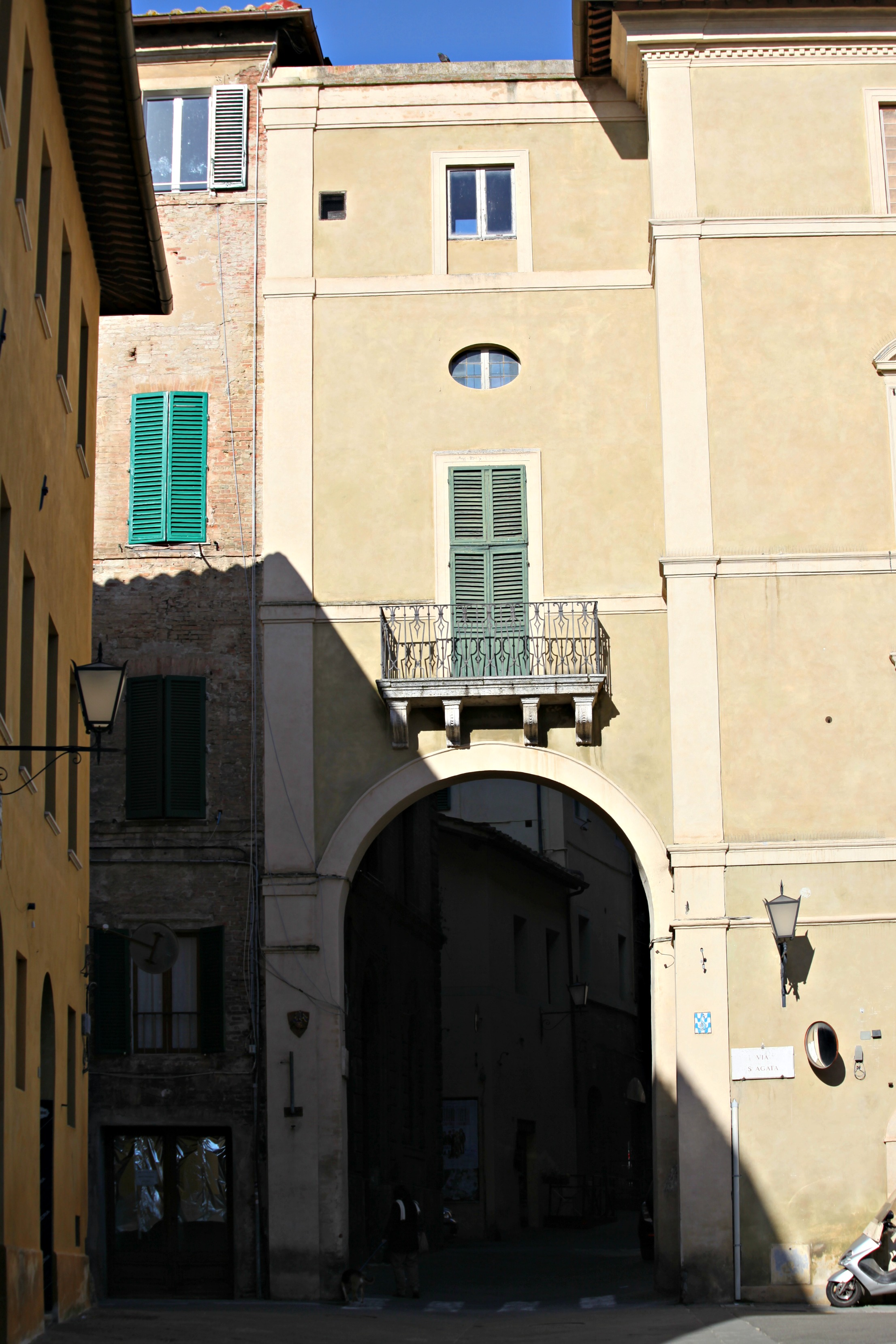 Esterno